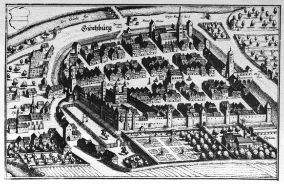 Günzburg (Schwaben, Bayern, Deutschland) im Jahre 1643